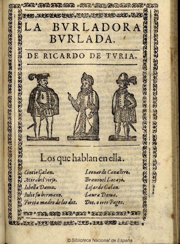 Portada de la comedia de Ricardo de Turia, seudónimo de Luis Ferrer de Cardona.